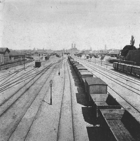 Blick von der Hackerbrücke aus auf den Hauptbahnhof